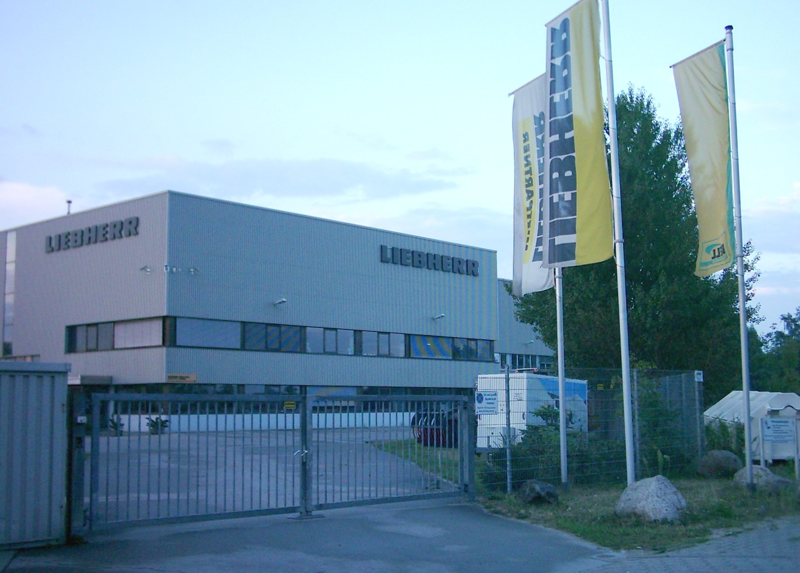 Liebherr Niederlassung in Hamburg-Harburg.